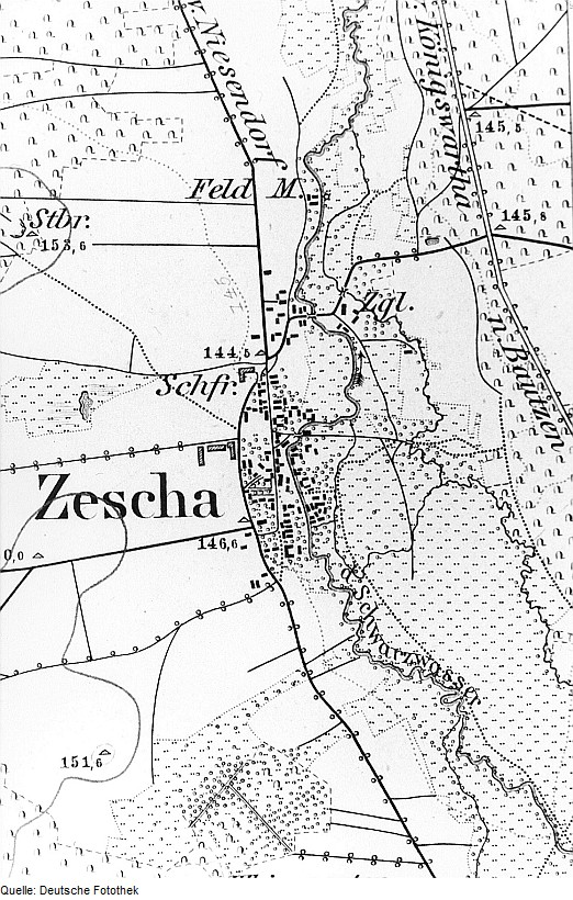 Original image description from the Deutsche Fotothek Neschwitz-Zescha. Meßtischblatt, Sekt. Kloster Marienstern, 1884